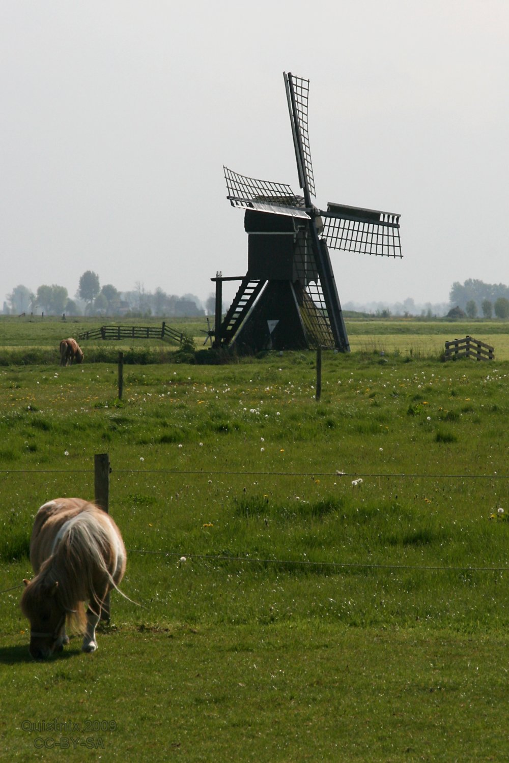 Tzum: Spinnenkop Teetlum, met omgeving